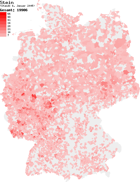 Verteilung des Nachnamens Stein in Deutschland nach dem Telefonbuch mit Stand vom 6. Januar 2005